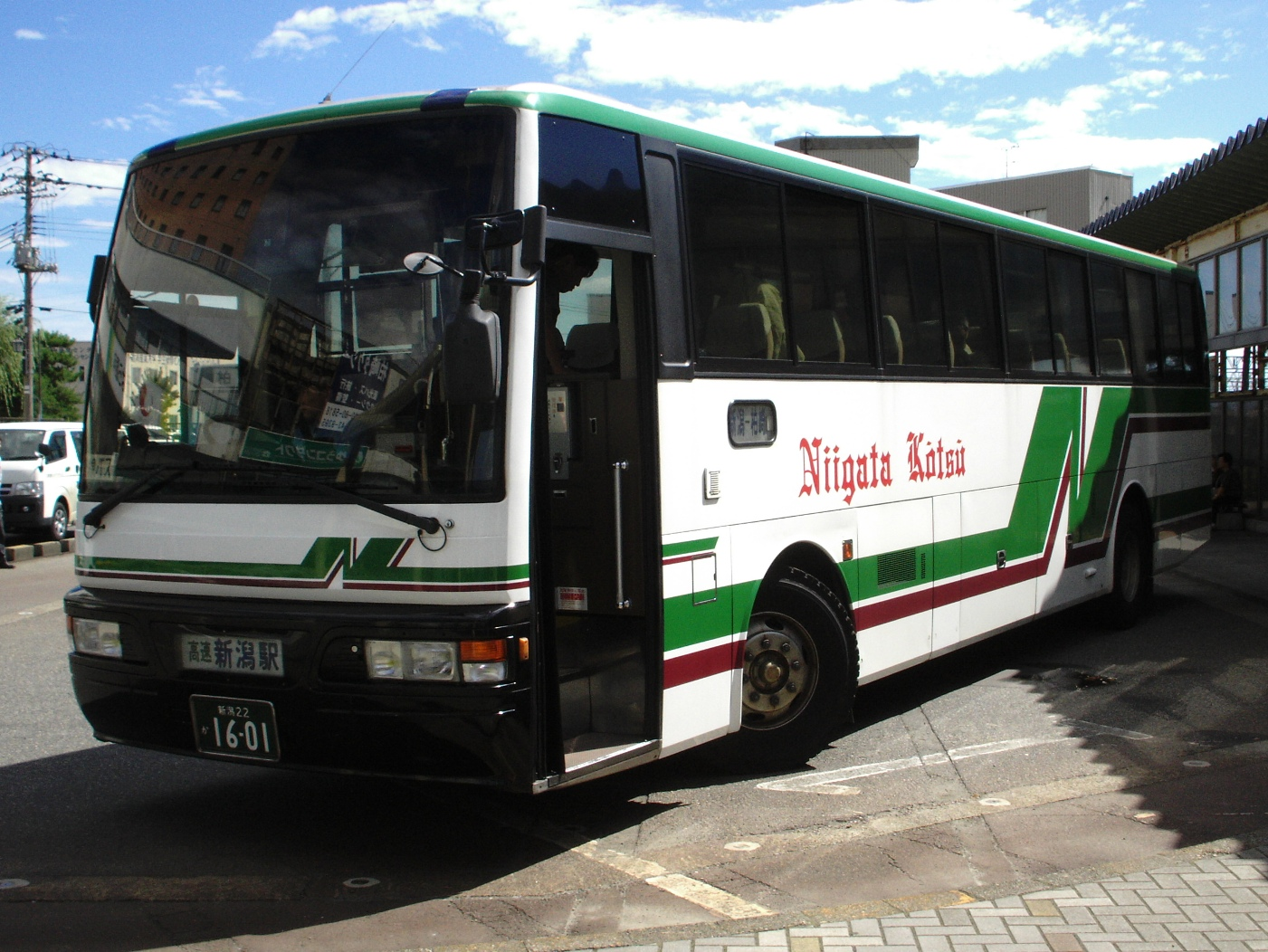 新潟交通高速バス新潟～柏崎線。柏崎駅前にて撮影。